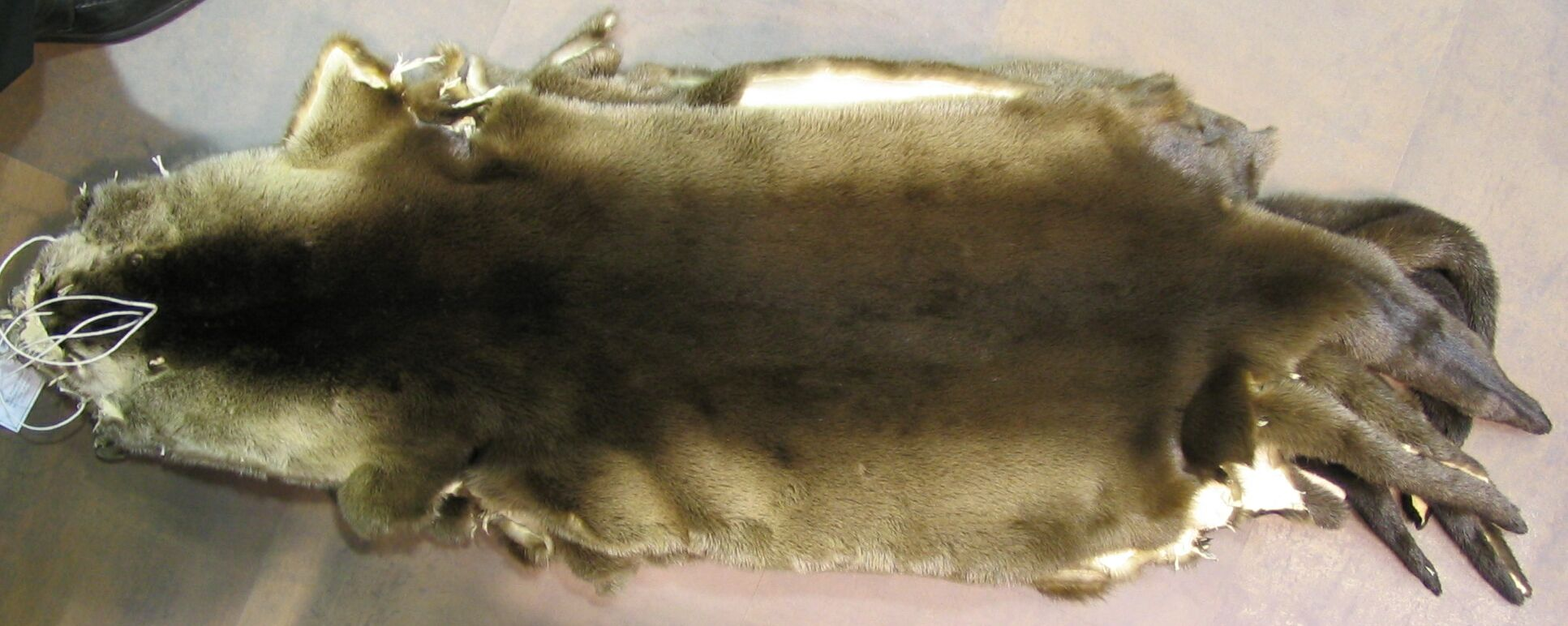 Northamerican river otter fur-skins/ Nordamerikanische Fischotterfelle auf der Pelzmesse Mifur in Mailand.